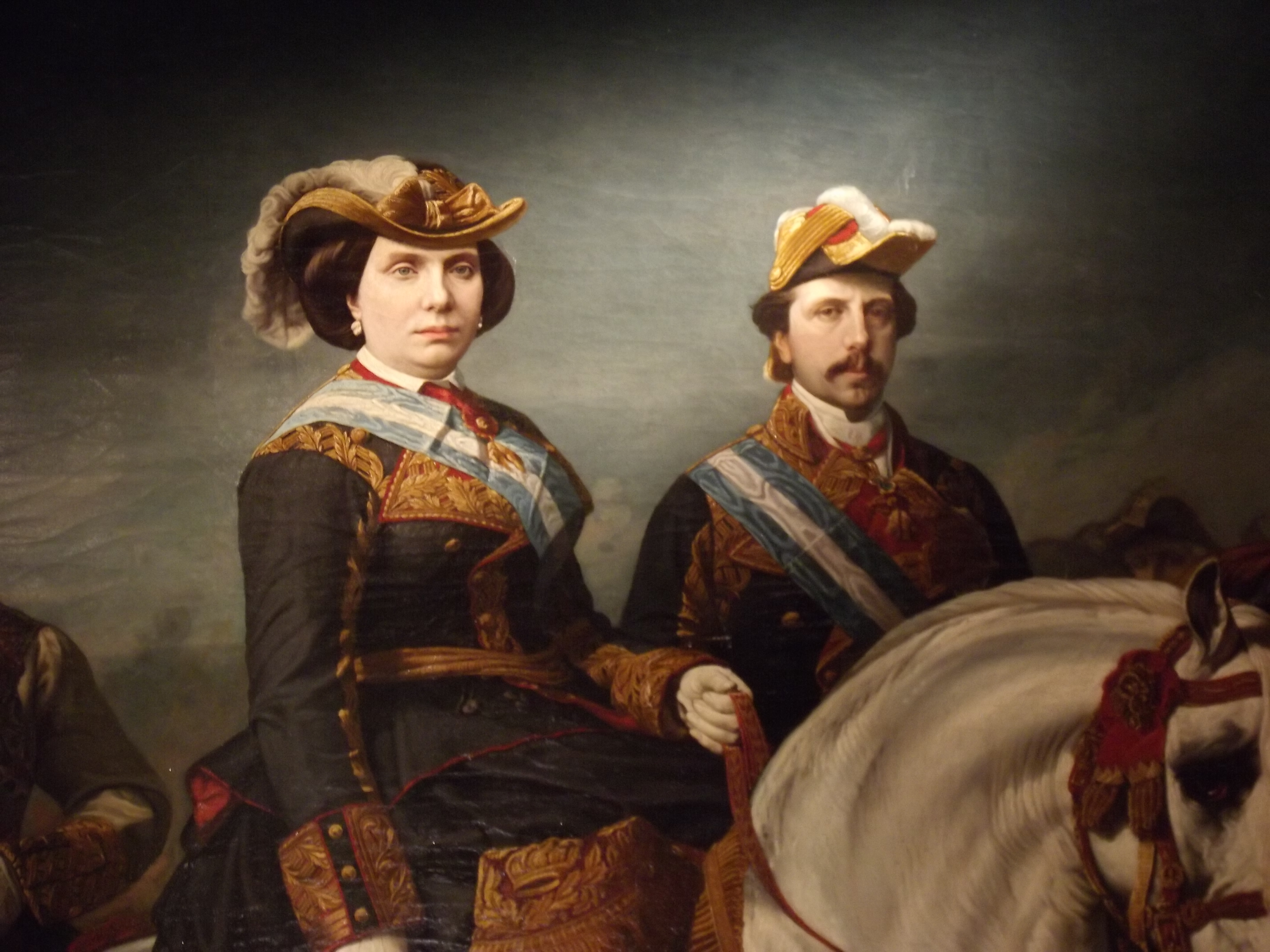 Detalle de Isabel II dirigiendo una revista militar, de Charles Porion. Óleo sobre lienzo.